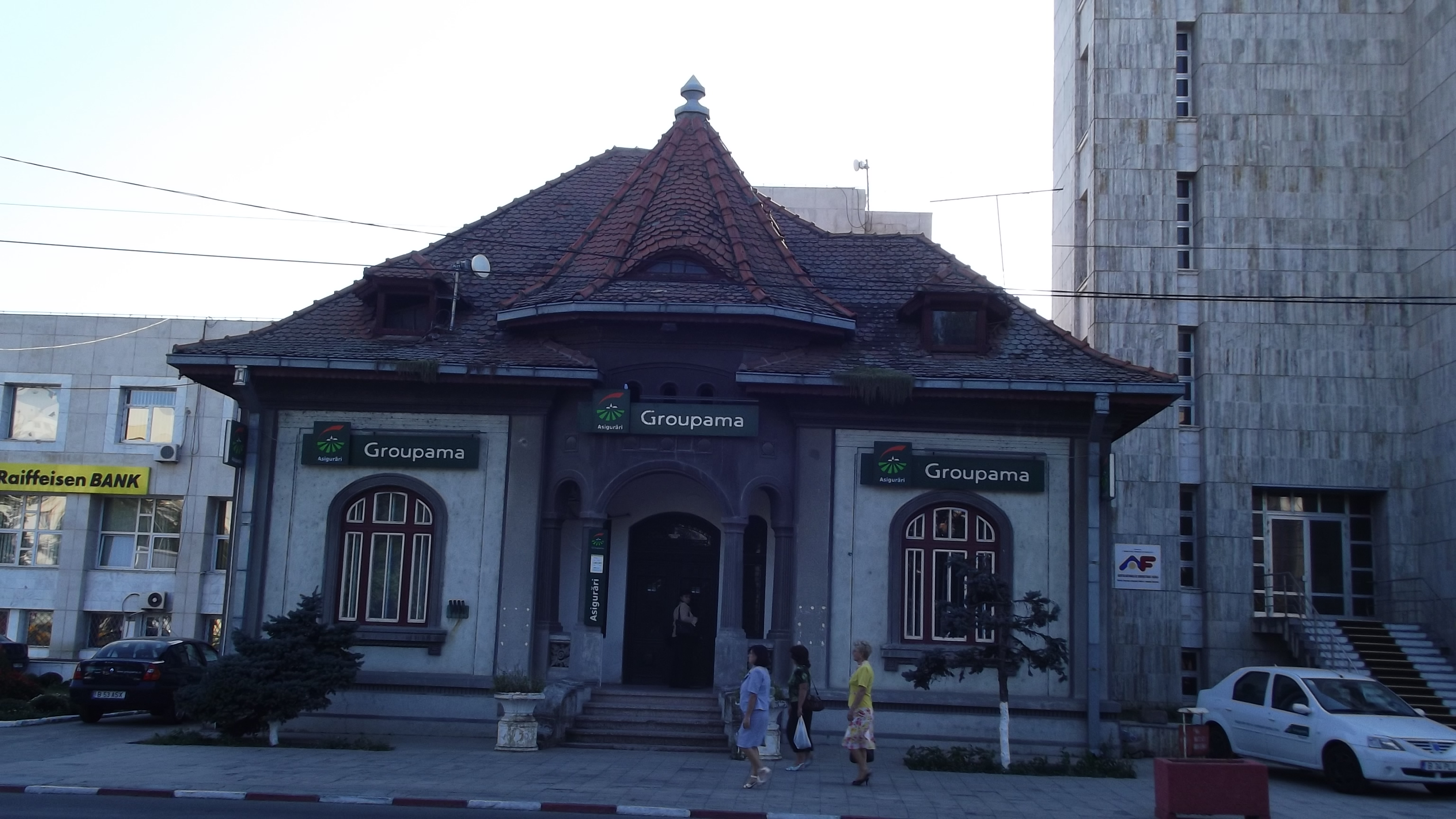 Alexandria-Teleorman-Ro: Casa Marin Vasilescu, fost sediu al silvicultorilor, azi sediul Groupama, in umbra monstrilor de beton. Construita la inceputul secolului XX.